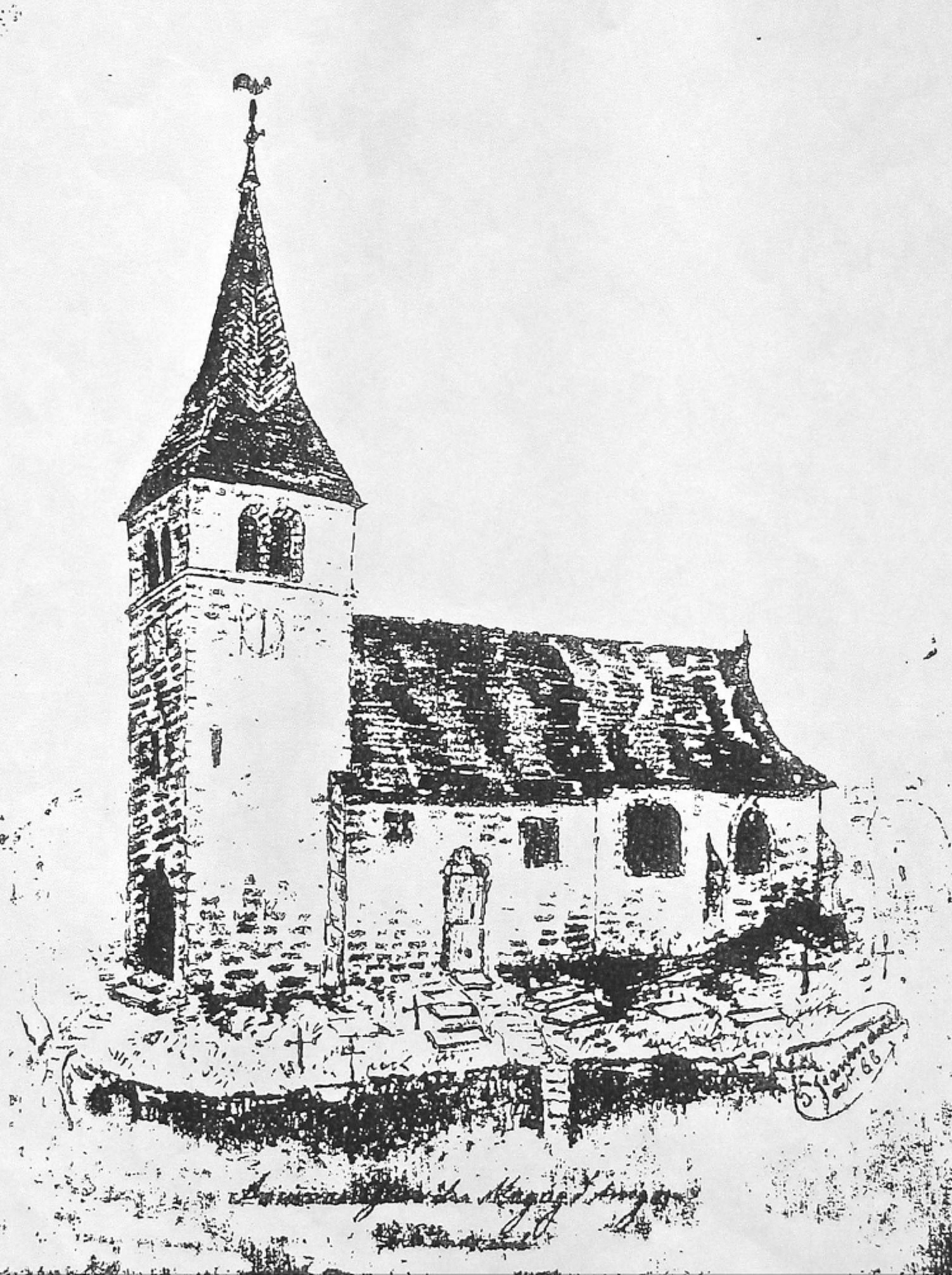 L'ancienne église du Magny-Danigon (Haute-Saône).